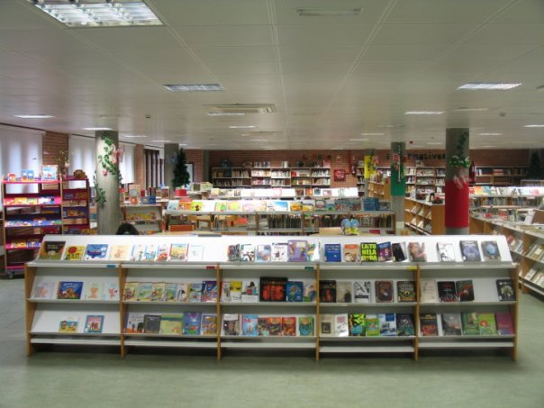 Sala infantil de la Biblioteca Nodal de Lugo